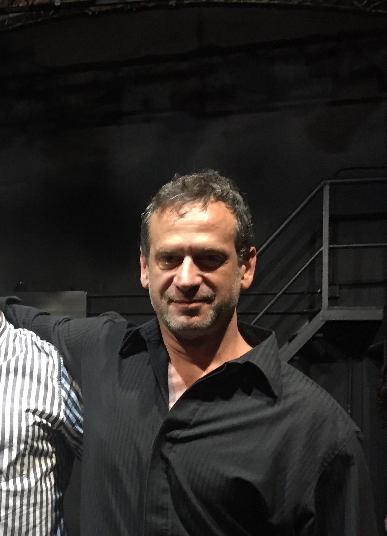 El actor, director, productor y guionista Daniel Kuzniecka en 2017.